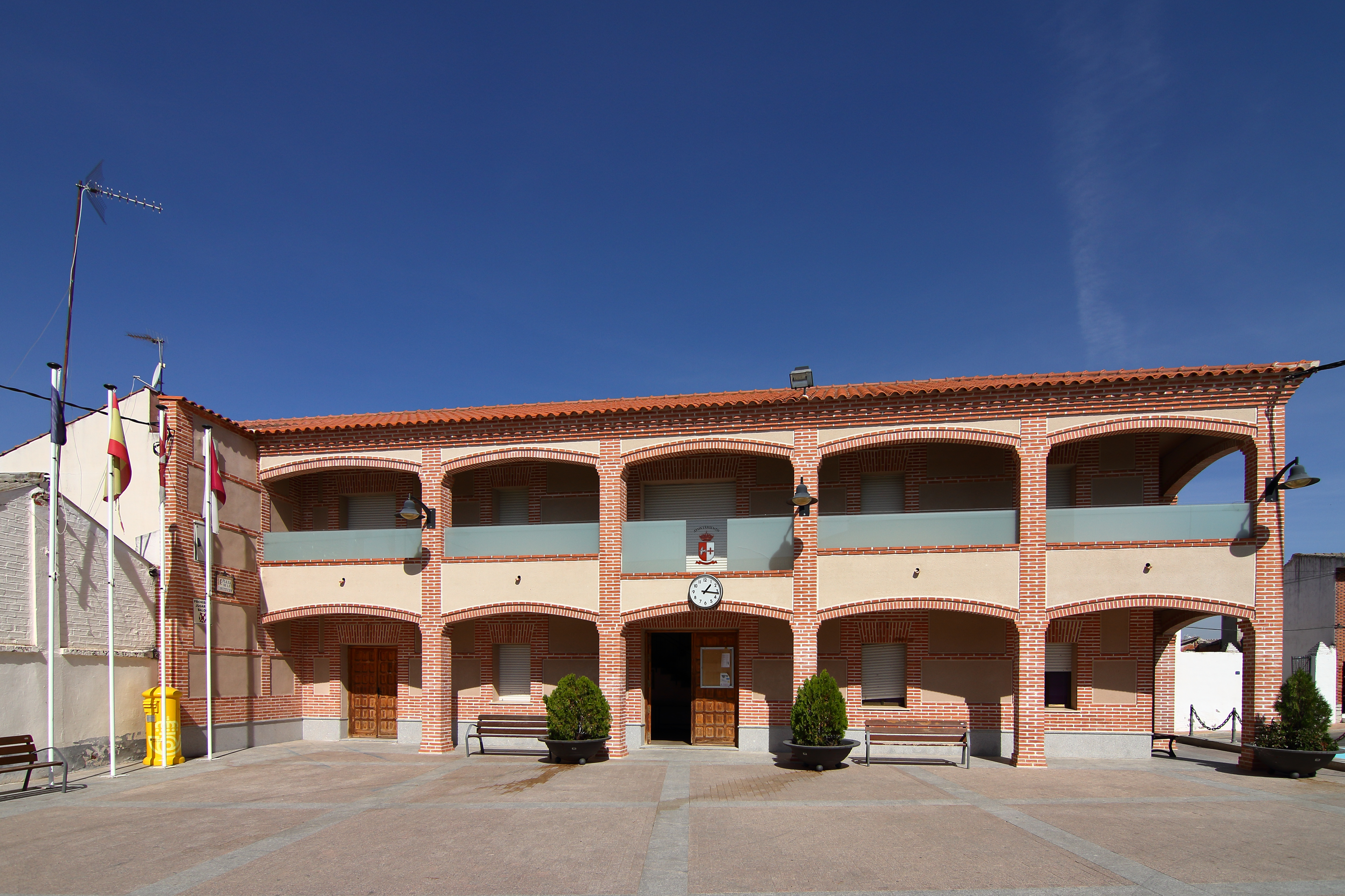 Ayuntamiento de Palomeque